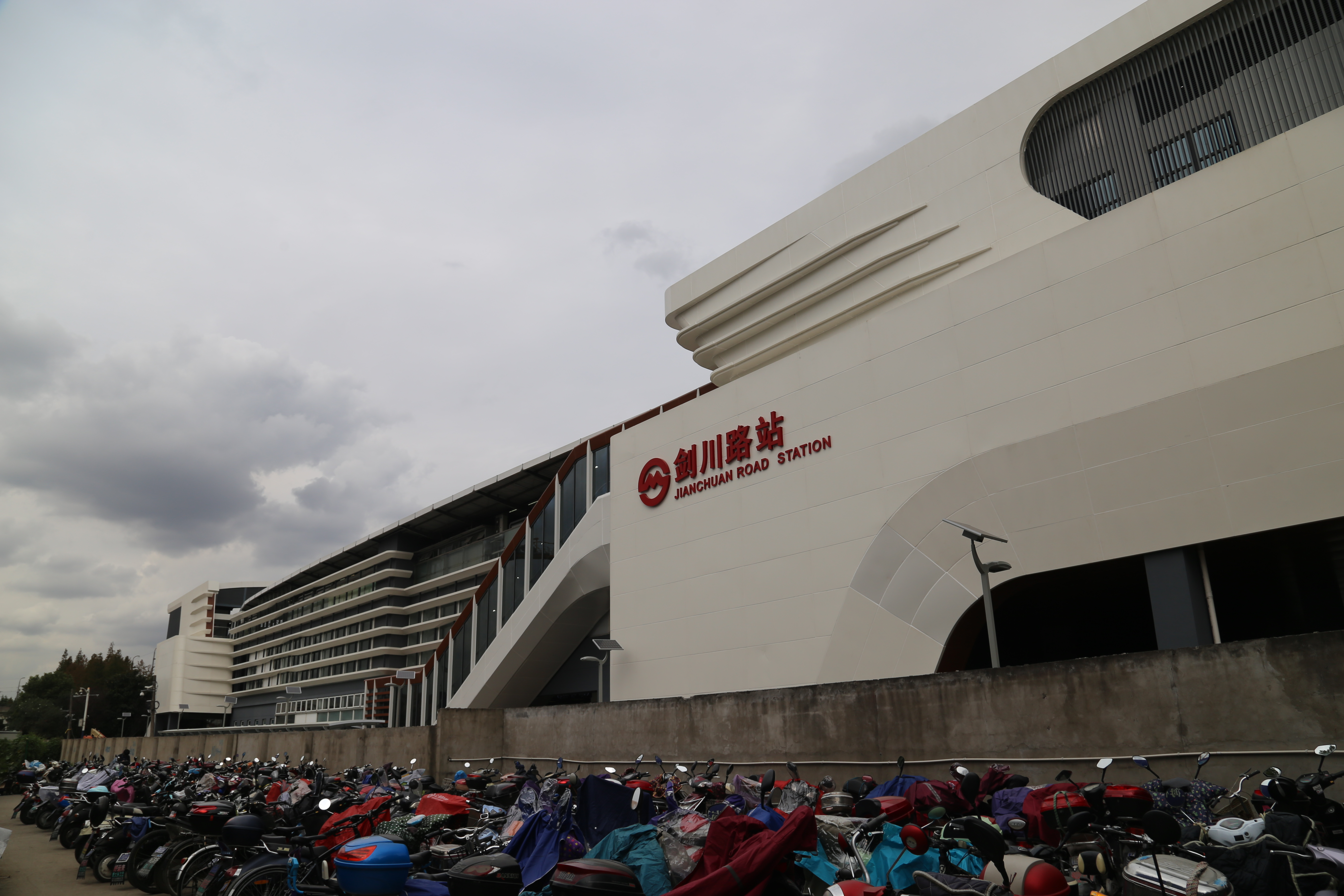 翻新后的剑川路站站房